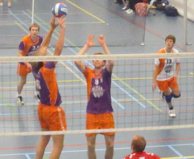 Een middenaanval van Harambee.